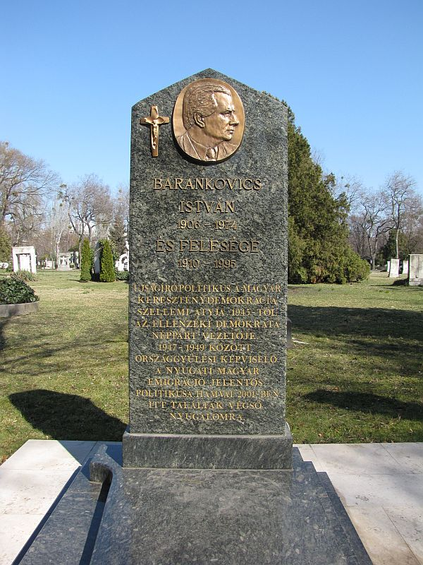 Barankovics István (Polgár, 1906 - New York, 1974) újságíró, politikus (1943-tól a Magyar Nemzet főszerkesztője, Kereszténydemokrata Néppárt főtitkára 1945-től. 1949-től emigrációban élt) sírja Budapesten. Kerepesi temető: 35-1-63